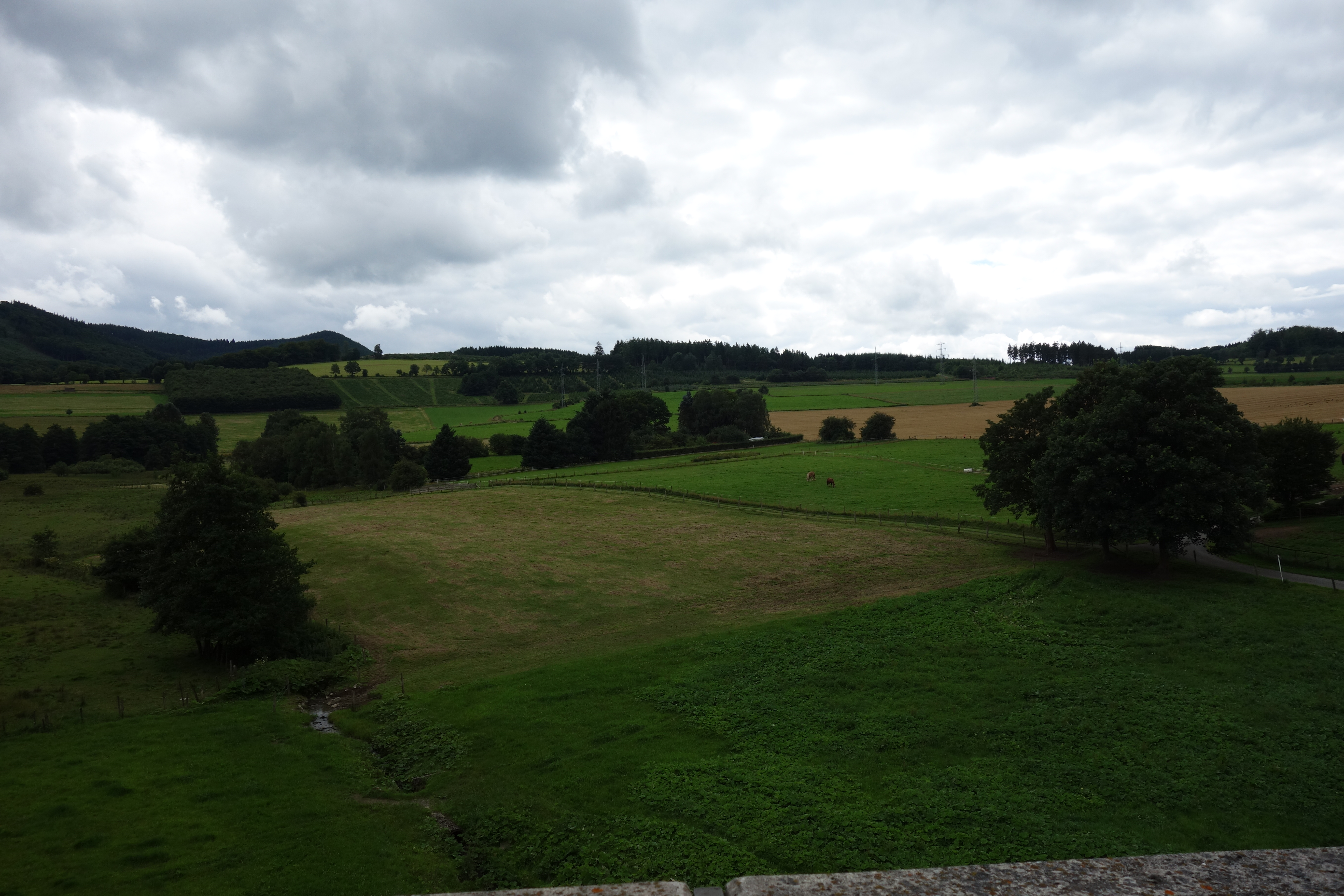 Offenland gehört zum Landschaftsschutzgebiet Extensivgrünland zwischen Bigge und Helmeringhausen und Wald zum Landschaftsschutzgebiet Bestwig. Von Brücke am Nordrand aufgenommen.